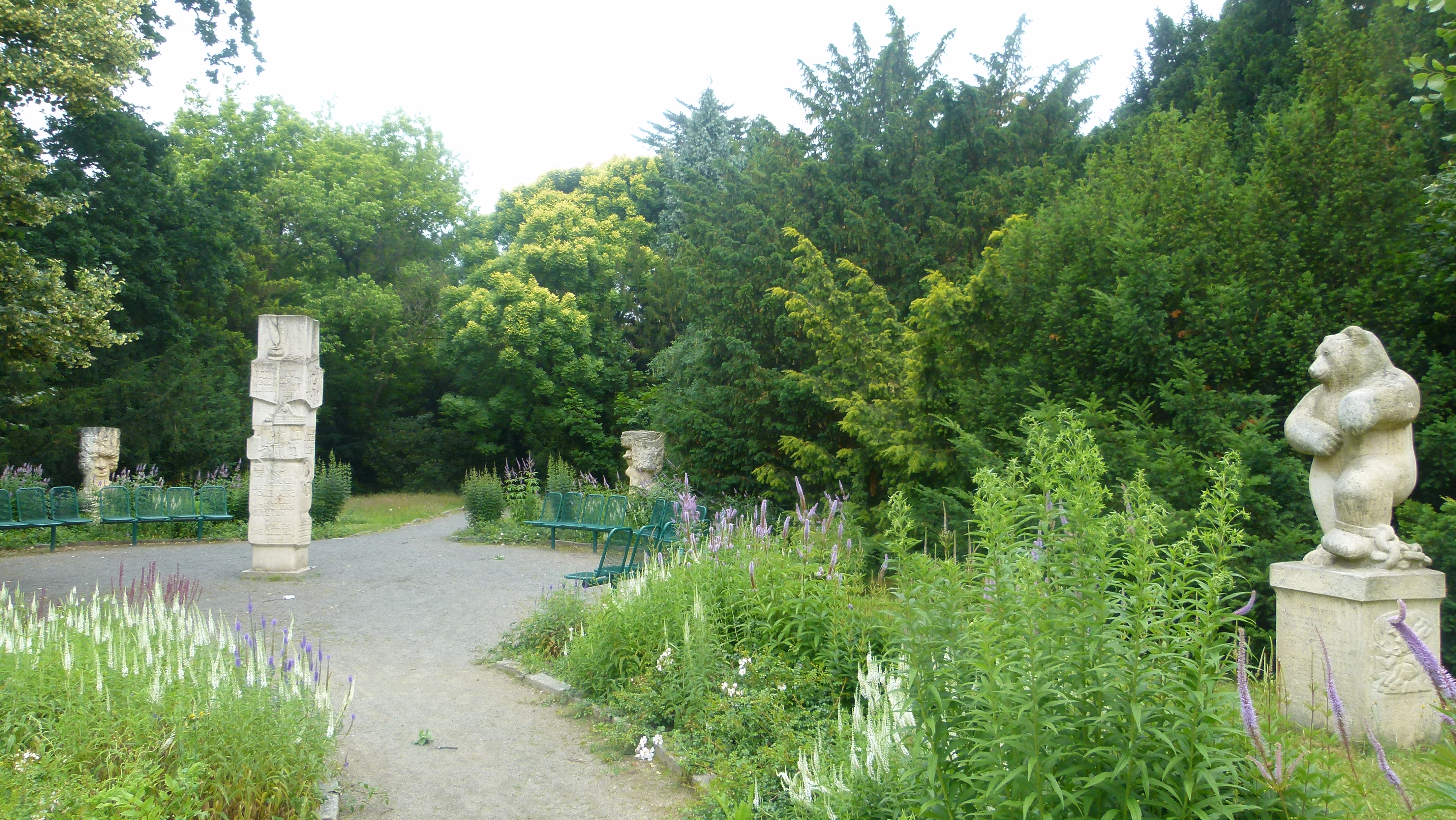 Vier Plastiken des Bildhauers Johannes Peschel zu Fabeln von Lessing